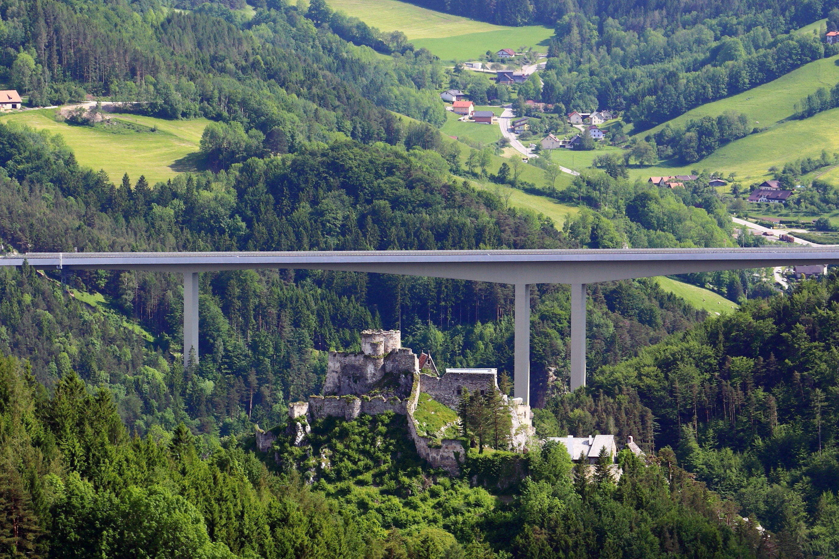 Nordansicht (vom Kreuzberg) der Burgruine Klamm in der niederösterreichischen Gemeinde Breitenstein. Dahinter der 130 Meter hohe und 1989 fertiggestellte Talübergang Schottwien der Semmering Schnellstraße.